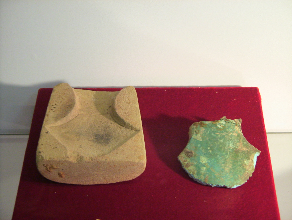 Lưỡi rìu đồng và khuôn đúc được tìm thấy tại quần thể di chỉ khảo cổ Cát Tiên, Lâm Đồng. An edge of axe mady by copper and the mold found in Cát Tiên sanctuary